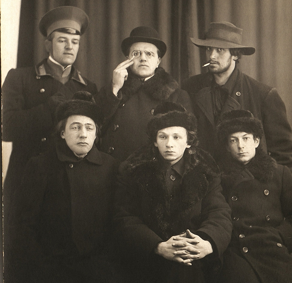 Сидят: В.В. Хлебников, Г.Л. Кузьмин, С.Д. Долинский Стоят: Н.Д. Бурлюк, Д.Д. Бурлюк, В.В. Маяковский Фотография поступила в музей 9 сентября 1937 г. от С.Д. Долинского В декабре 1912 г. группа футуристов, в которую входил В.В. Маяковский, написала коллективный манифест для альманаха «Пощечина общественному вкусу». А в феврале следующего года появилась листовка под тем же названием. Её издали Г.Л. Кузьмин и С.Д. Долинский. Авторы вместо подписей поместили свою групповую фотографию.